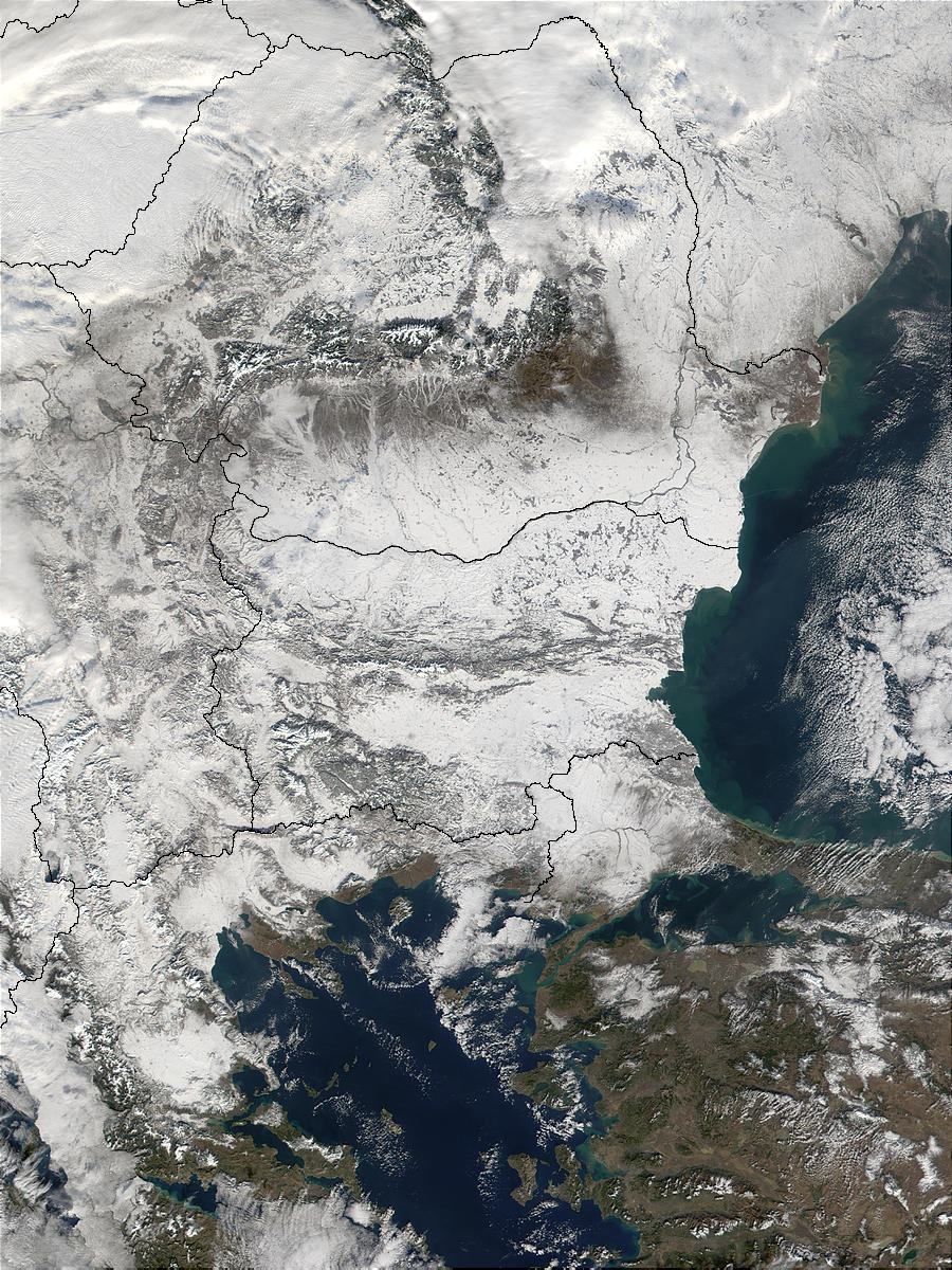 Satellietfoto van Balkan met sneeuw.